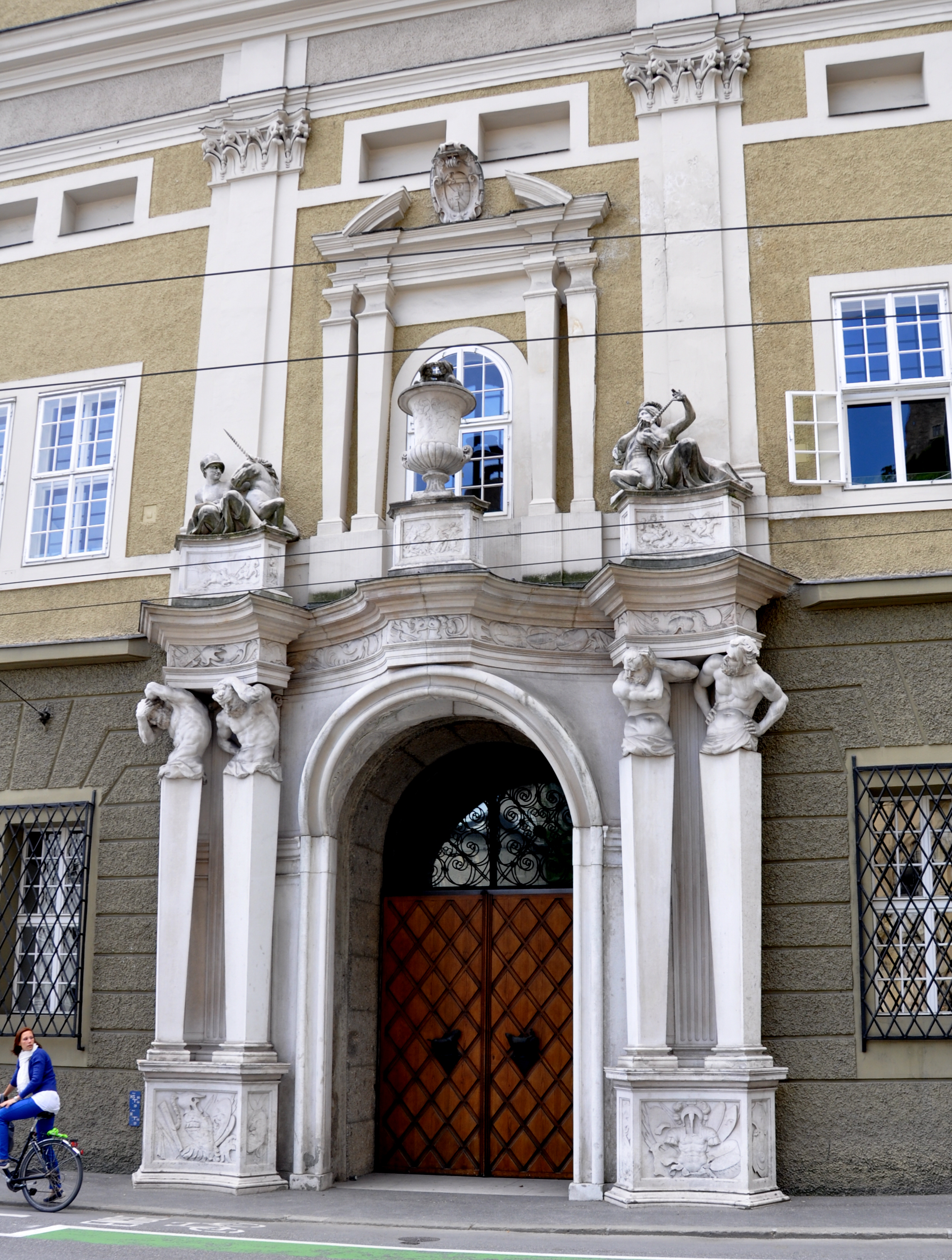 Salzburg, Großes Festspielhaus, Portal am Herbert-von-Karajan-Platz